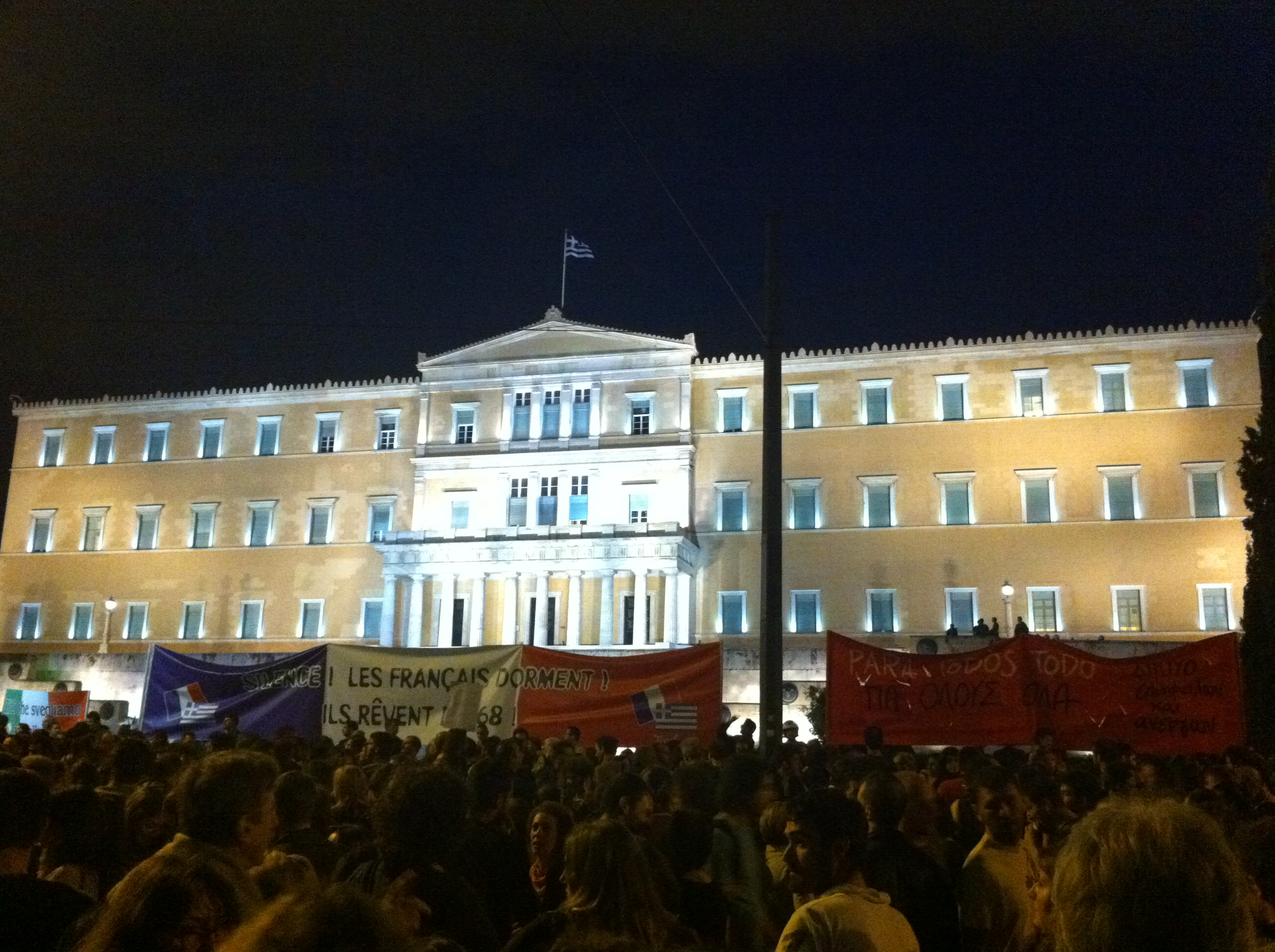 Agankrismenoi!